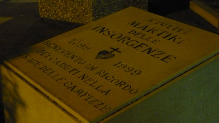 Foto del Monumento agli Insorgenti, in particolare ai Caduti nella Strage della Campizze, a Benevento (davanti la Statua di Papa Orsini).